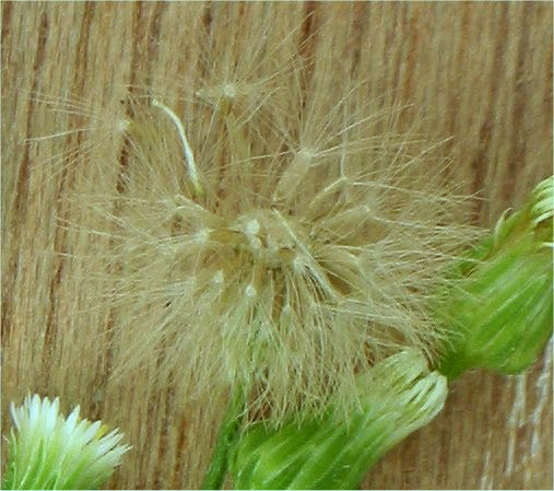 (nl: Canadese fijnstraal vruchten) Conyza canadensis